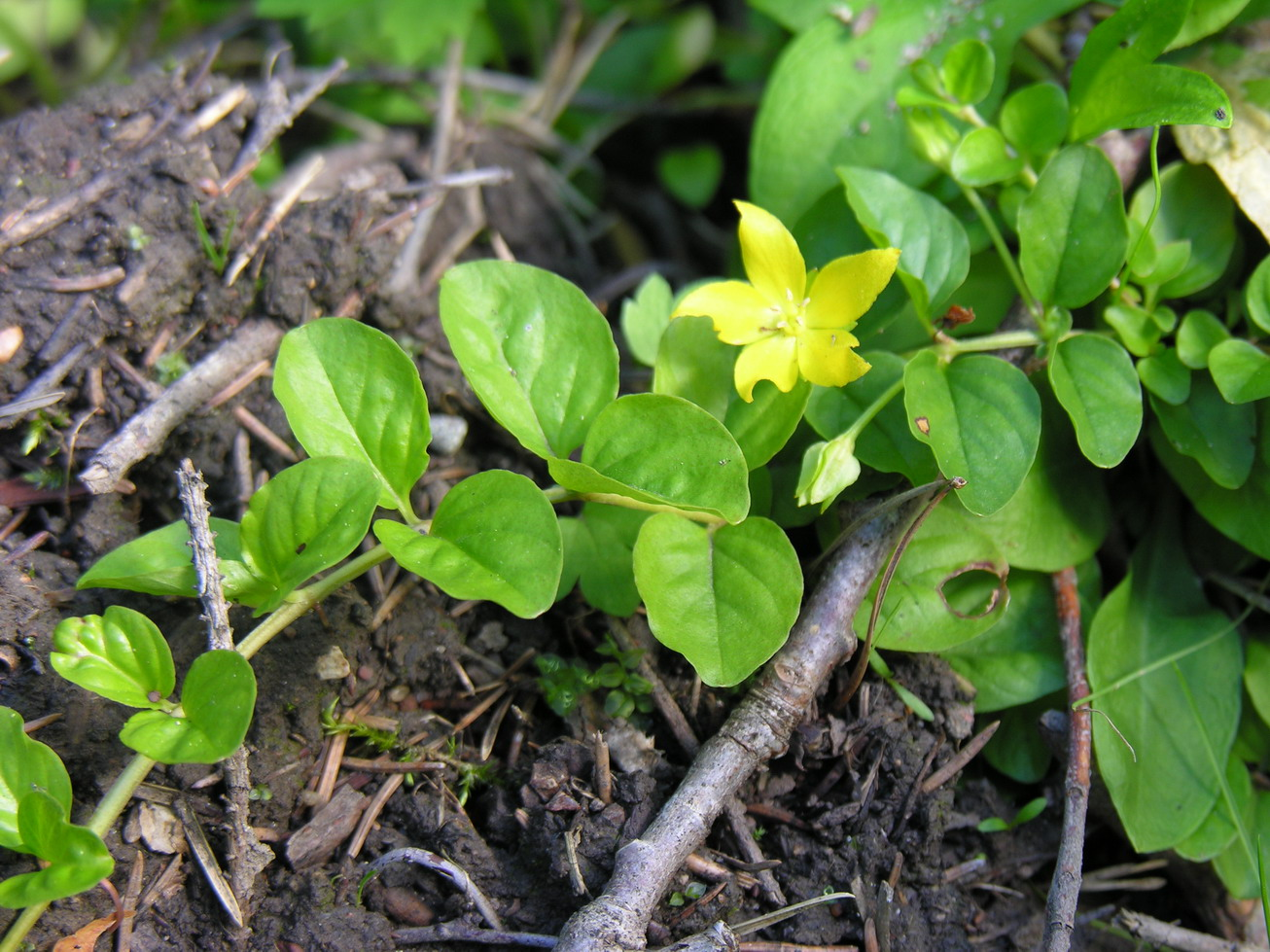 Šliaužiančioji šilingė (Lysimachia nummularia) Šeima. Mirseniniai (Myrsinaceae) Foto: Algirdas, 2005 m.